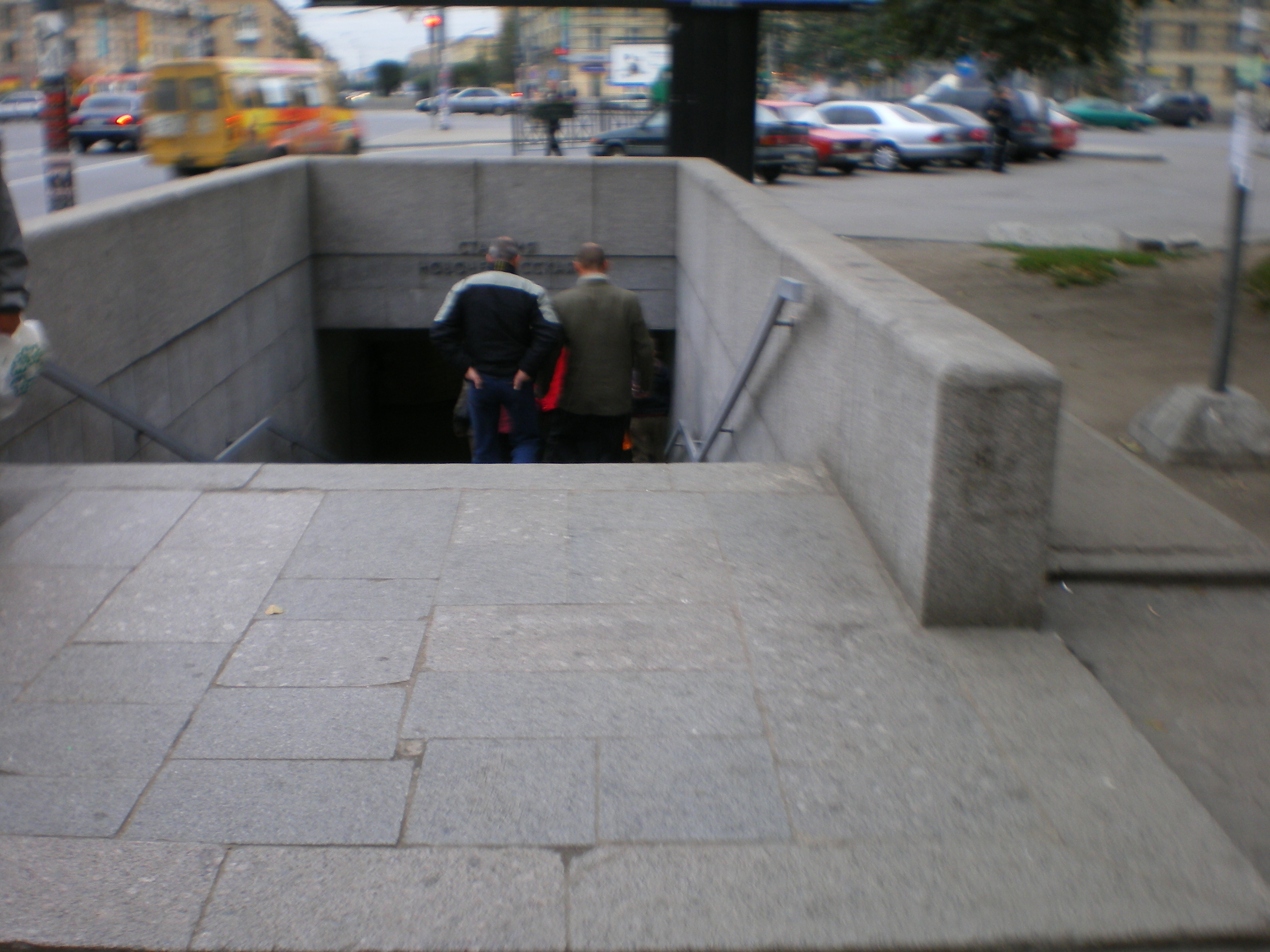 Станция метро «Новочеркасская». Вход в переход.